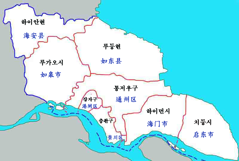 난퉁시 현급구역도